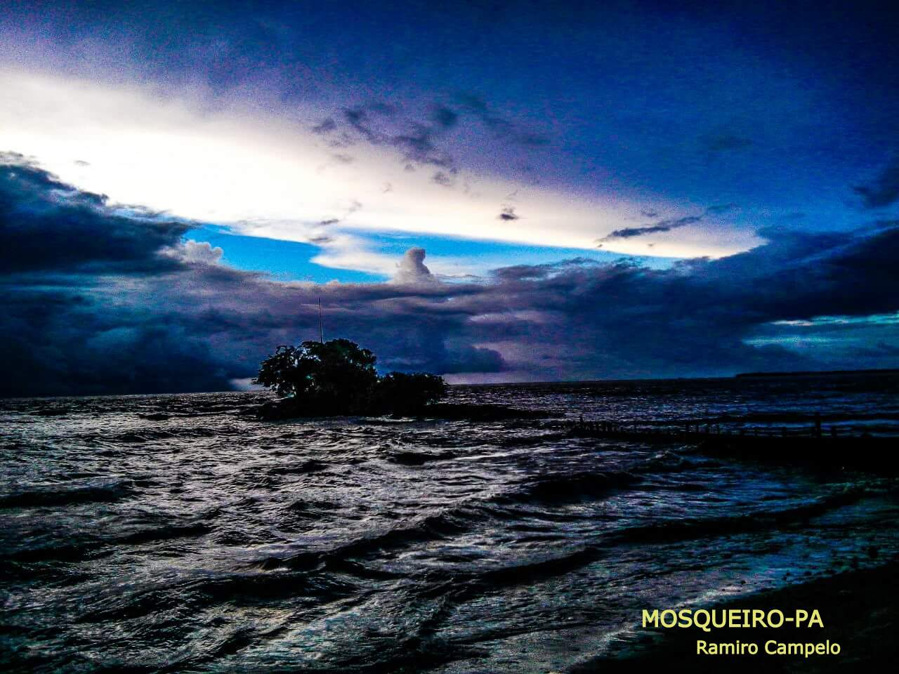 Liebesinsel